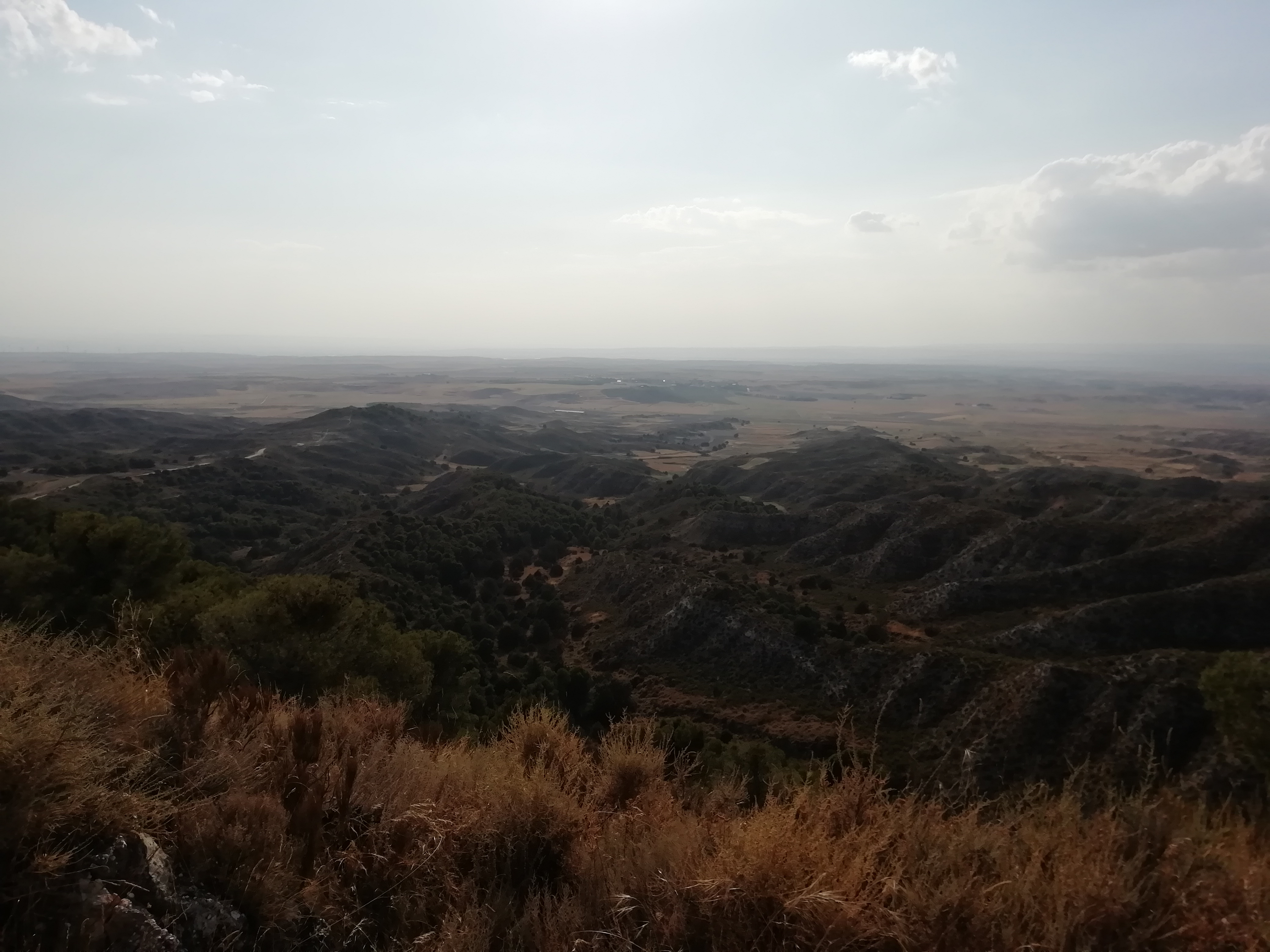 Paisaje en el término de Perdiguera.